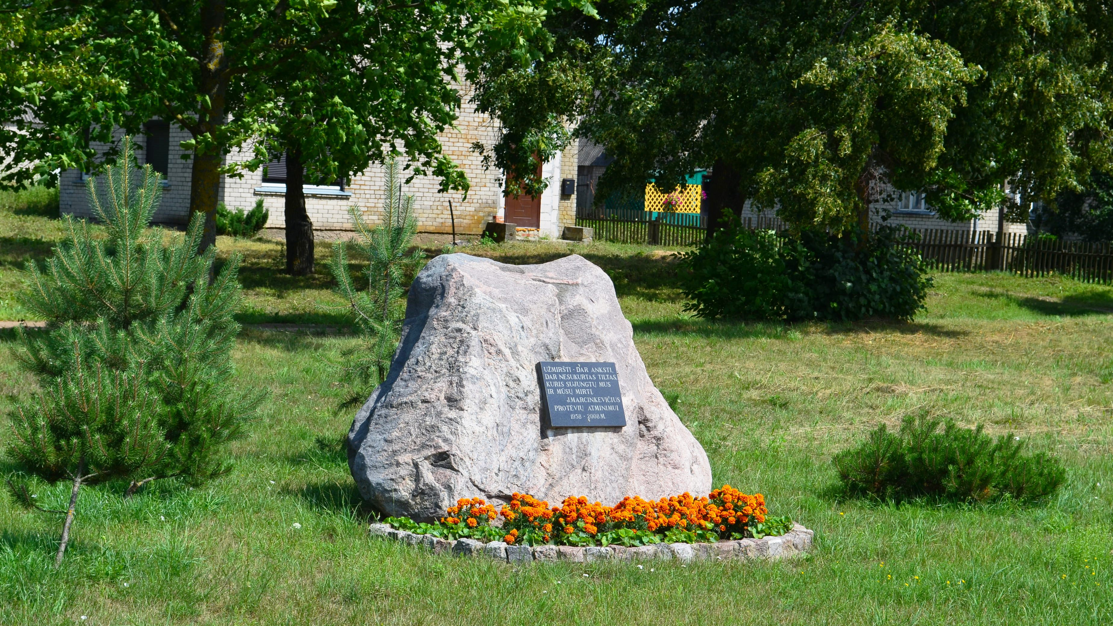 Paminklas J. Marcinkevičiaus protėviams. Medekšiai, Kėdainių raj.